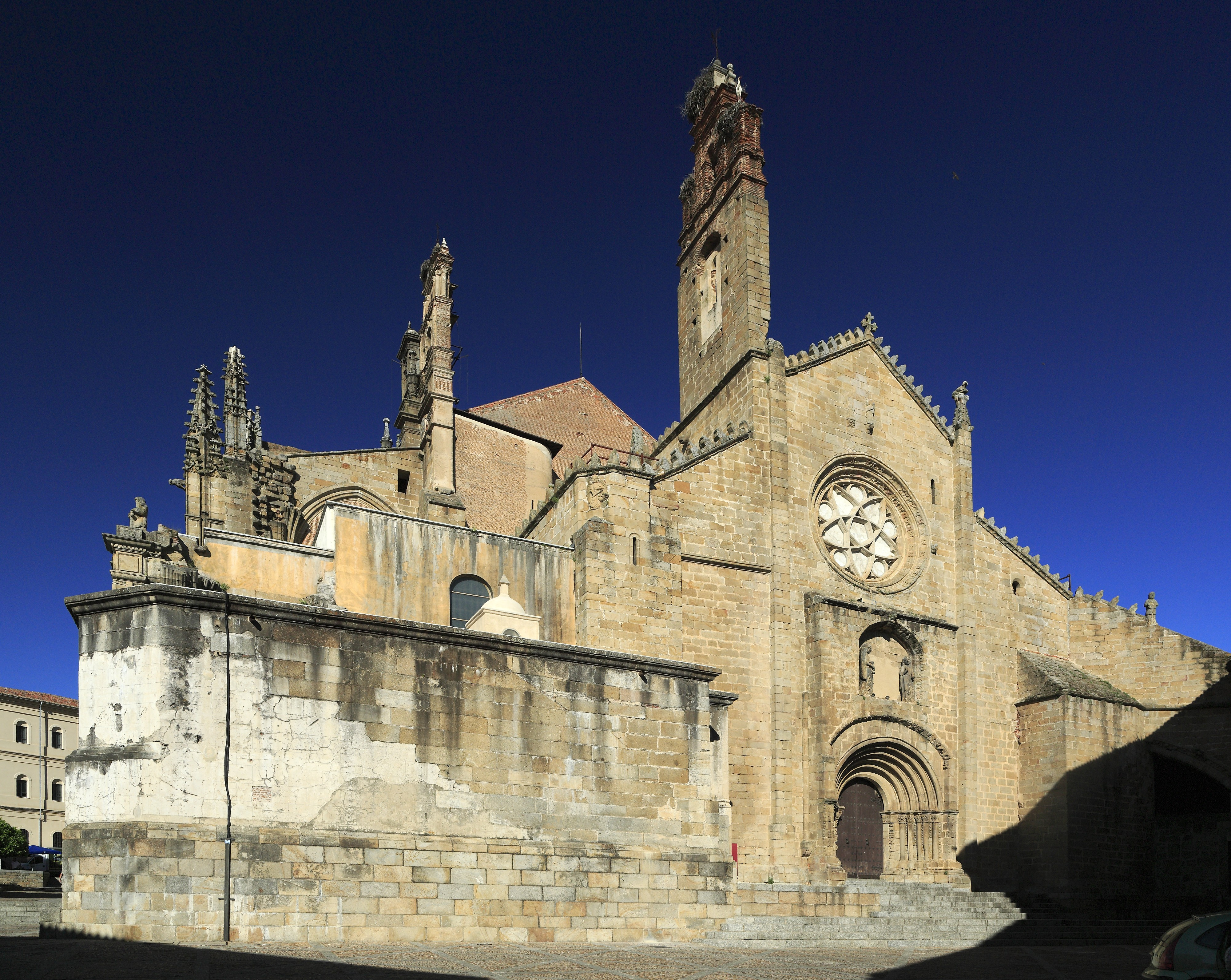 Westseite, nur hier ist die alte Kathedrale nicht von Teilen der neuen eingeschlossen.